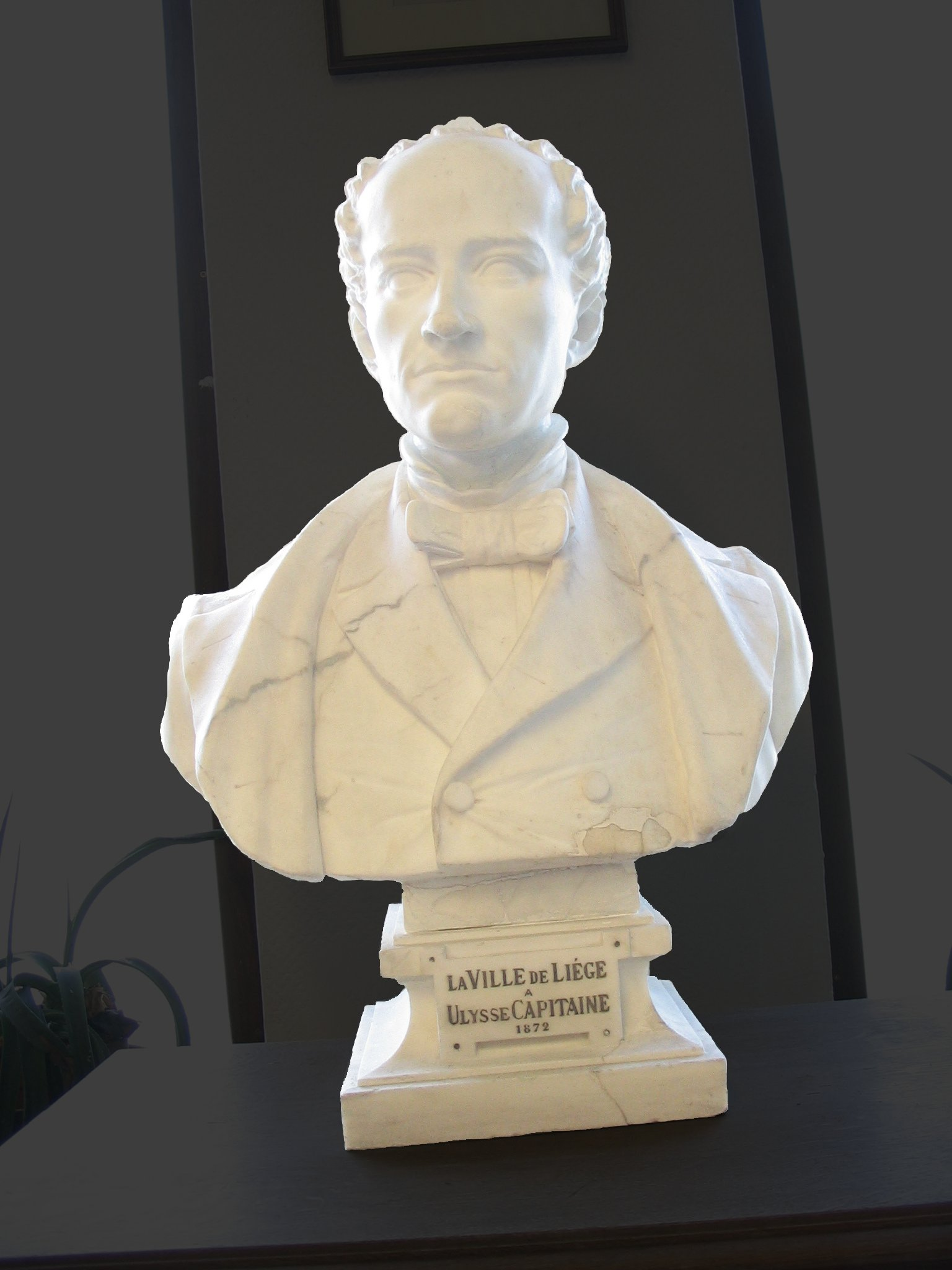 Buste de Ulysse Capitaine (Liège 1872) (par Jules Halkin) - Bibliothèque Ulysse Capitaine - Ville de Liège - 120 Feronstrée